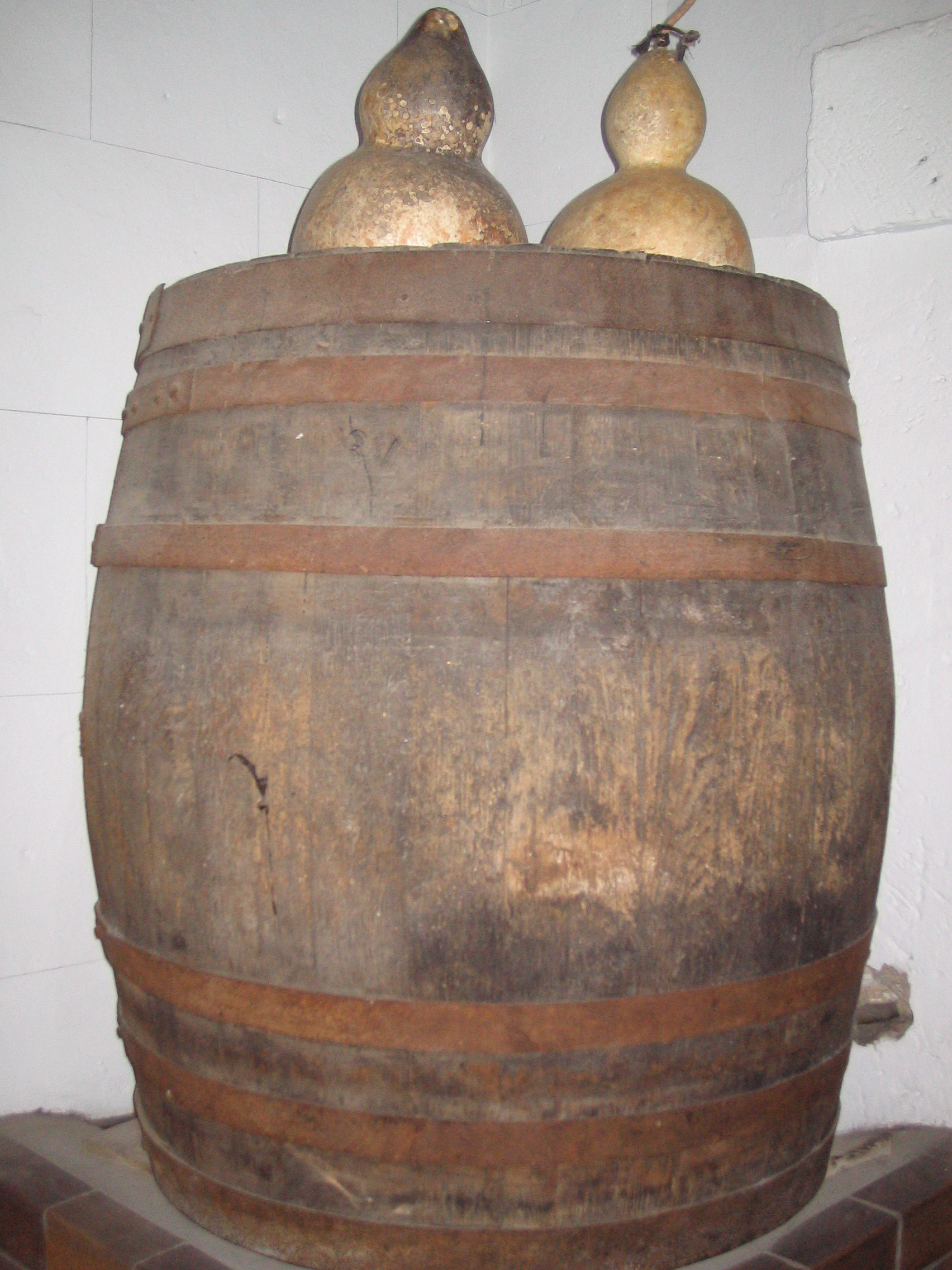 A huge barrel